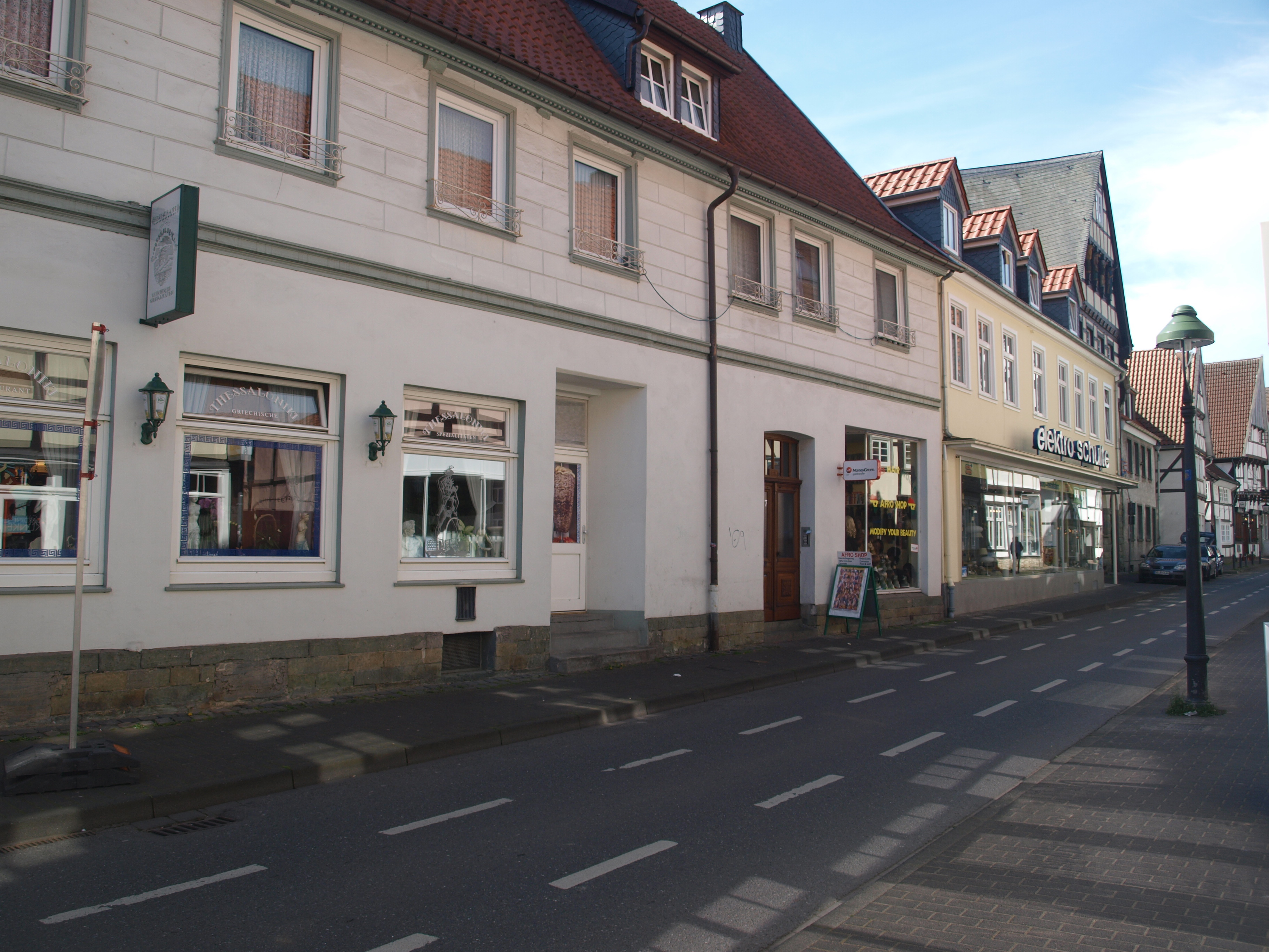 Stolpersteinlage Soest Jakobistr 27